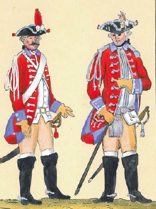 23. Regiment konny dragonów w zwykłym mundurze (szeregowy i oficer Gwardii Konnej Koronnej w mundurze zwykłym)